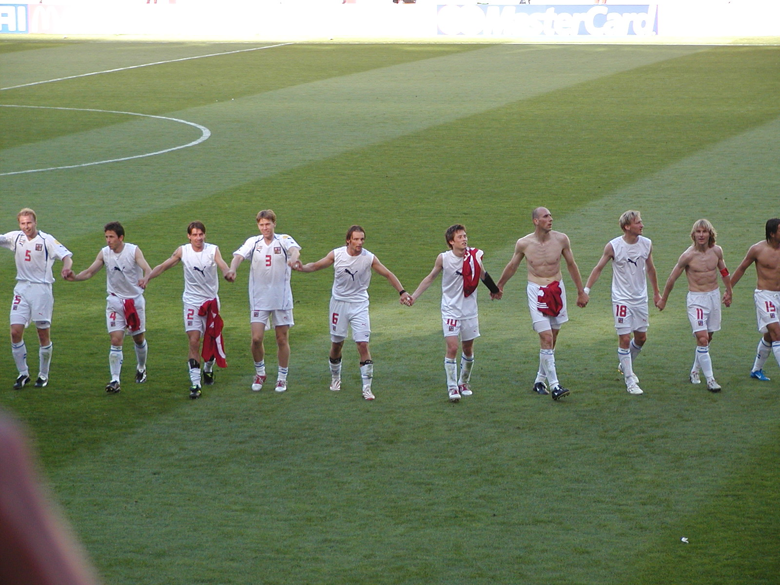 own work, 2004 StaraBlazkova